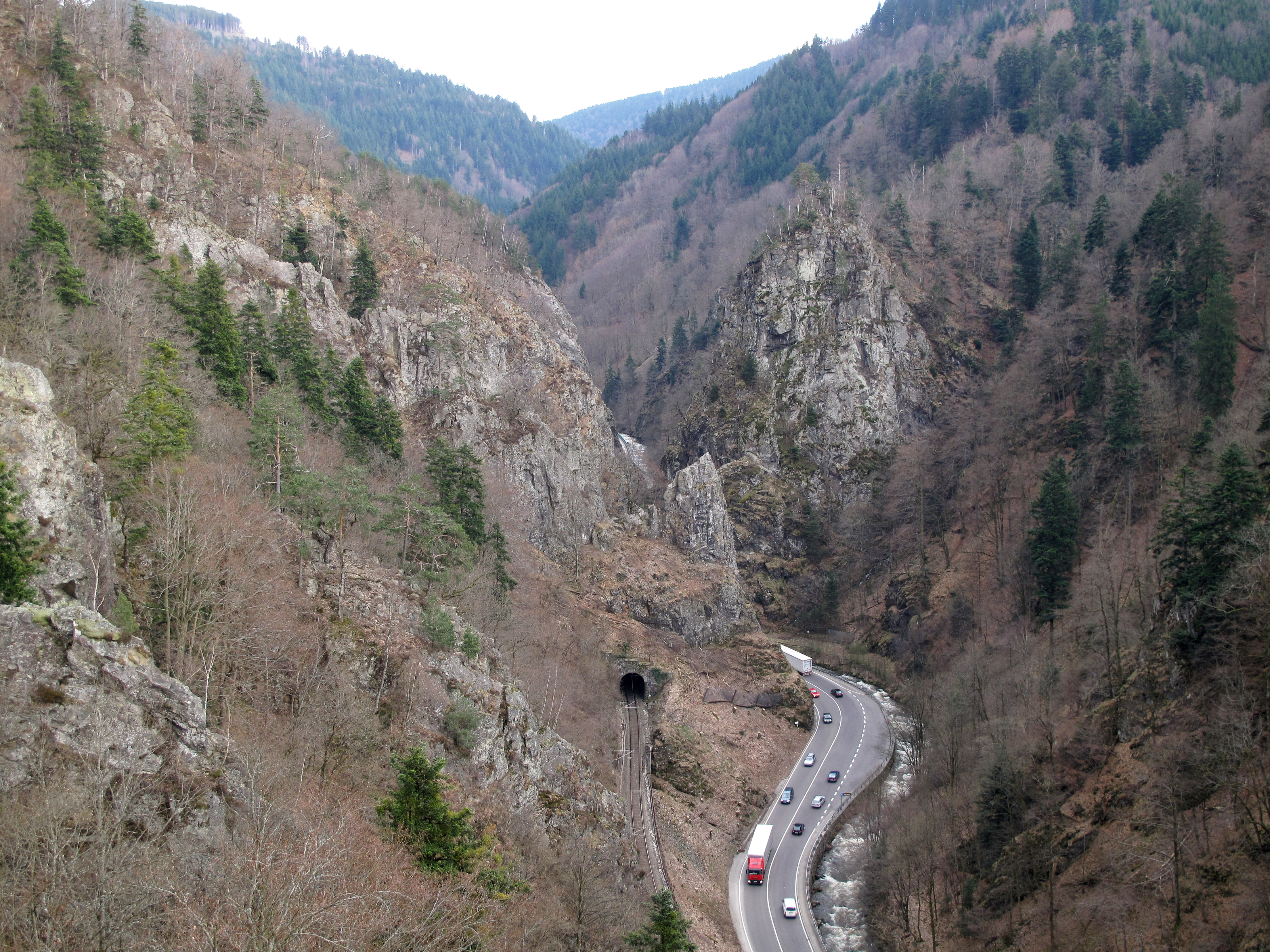 Die totale Kontrolle über den Verbindungsweg durchs Höllental - Ausblick in Richtung Hirschsprung.